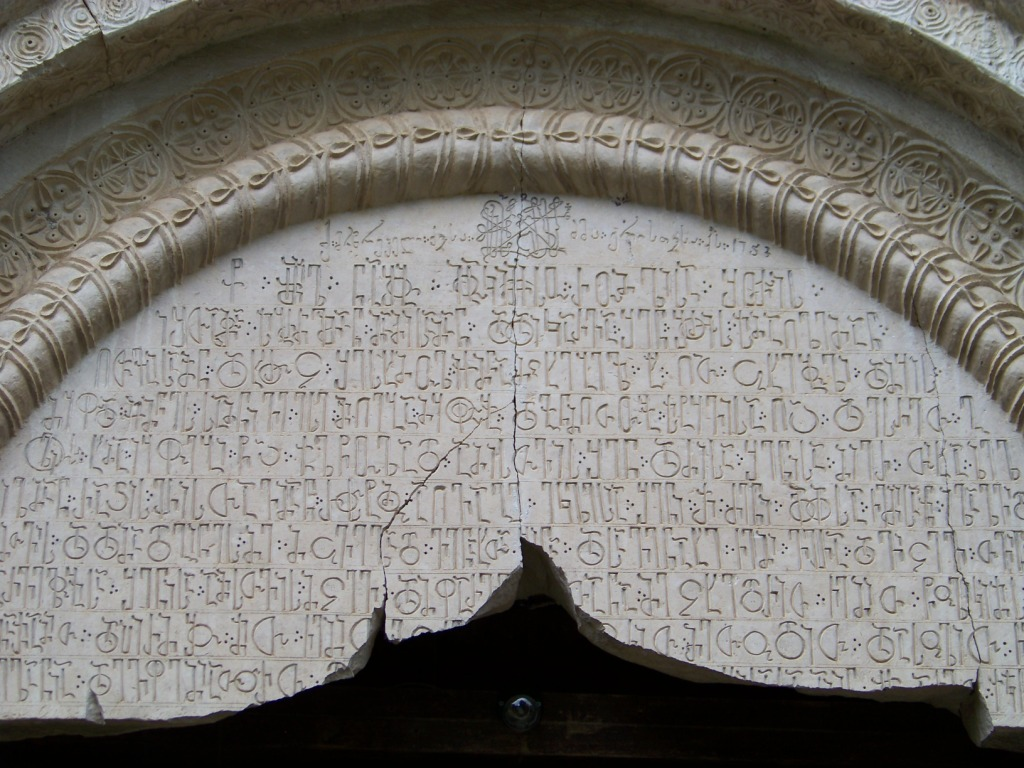 ბარაკონის კედლის წარწერა